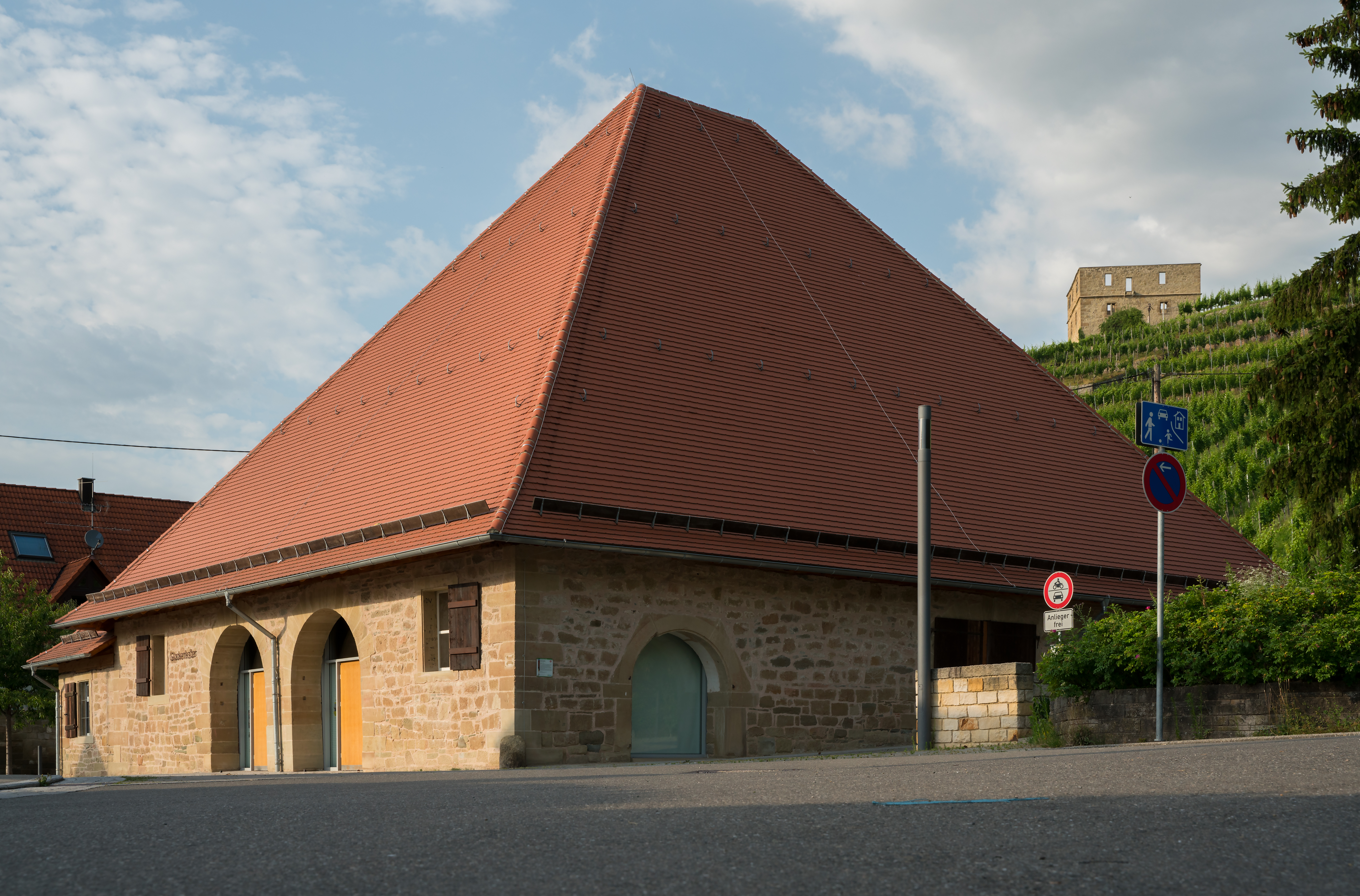 Die Glockenkelter in Stetten im Remstal.